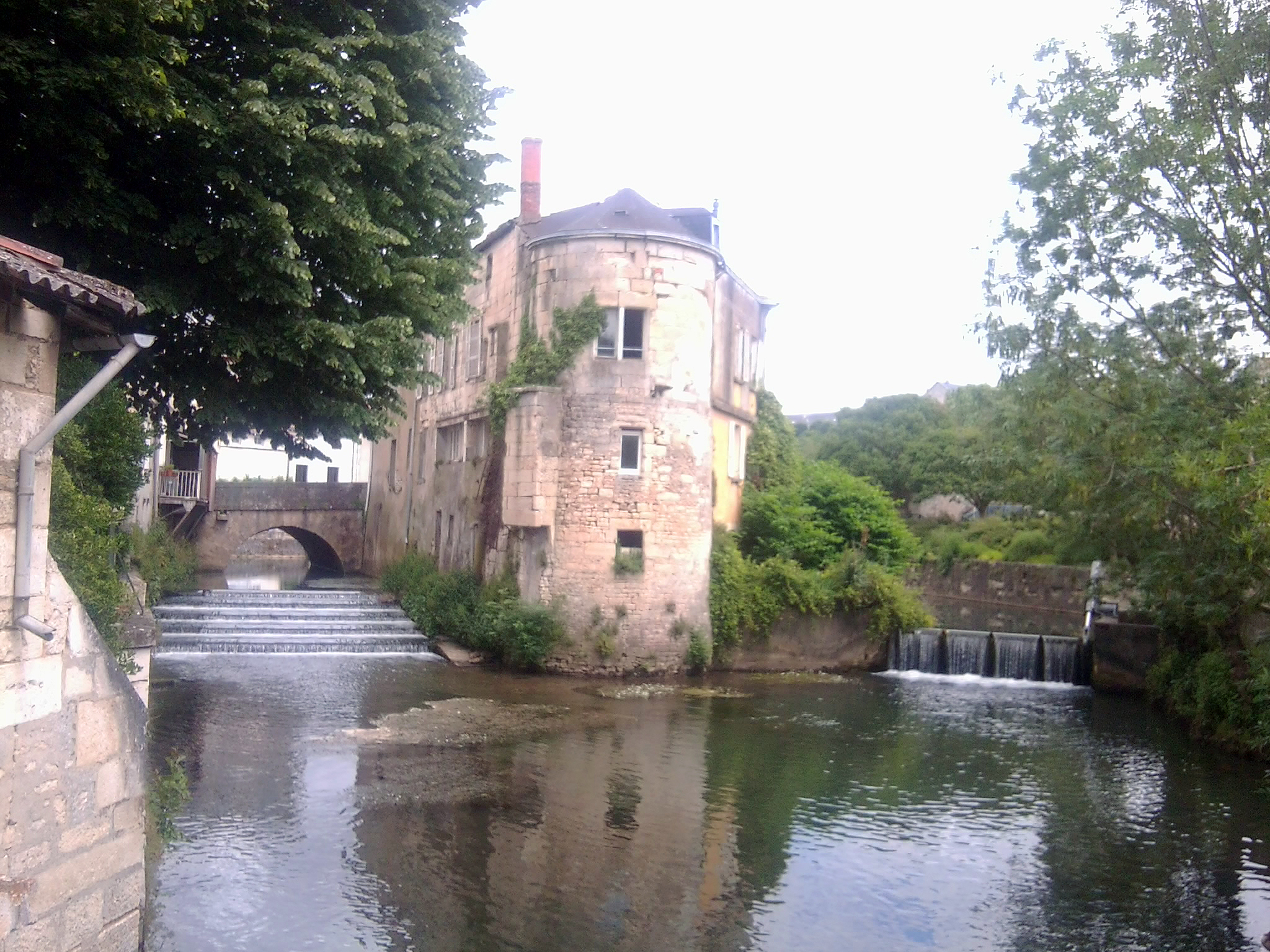 La Sèvre Niortaise à Niort (Deux-Sèvres - France). Derrière Les anciens bains juin se situant rue Pierre Antoine Baugier près des Vieux Ponts.